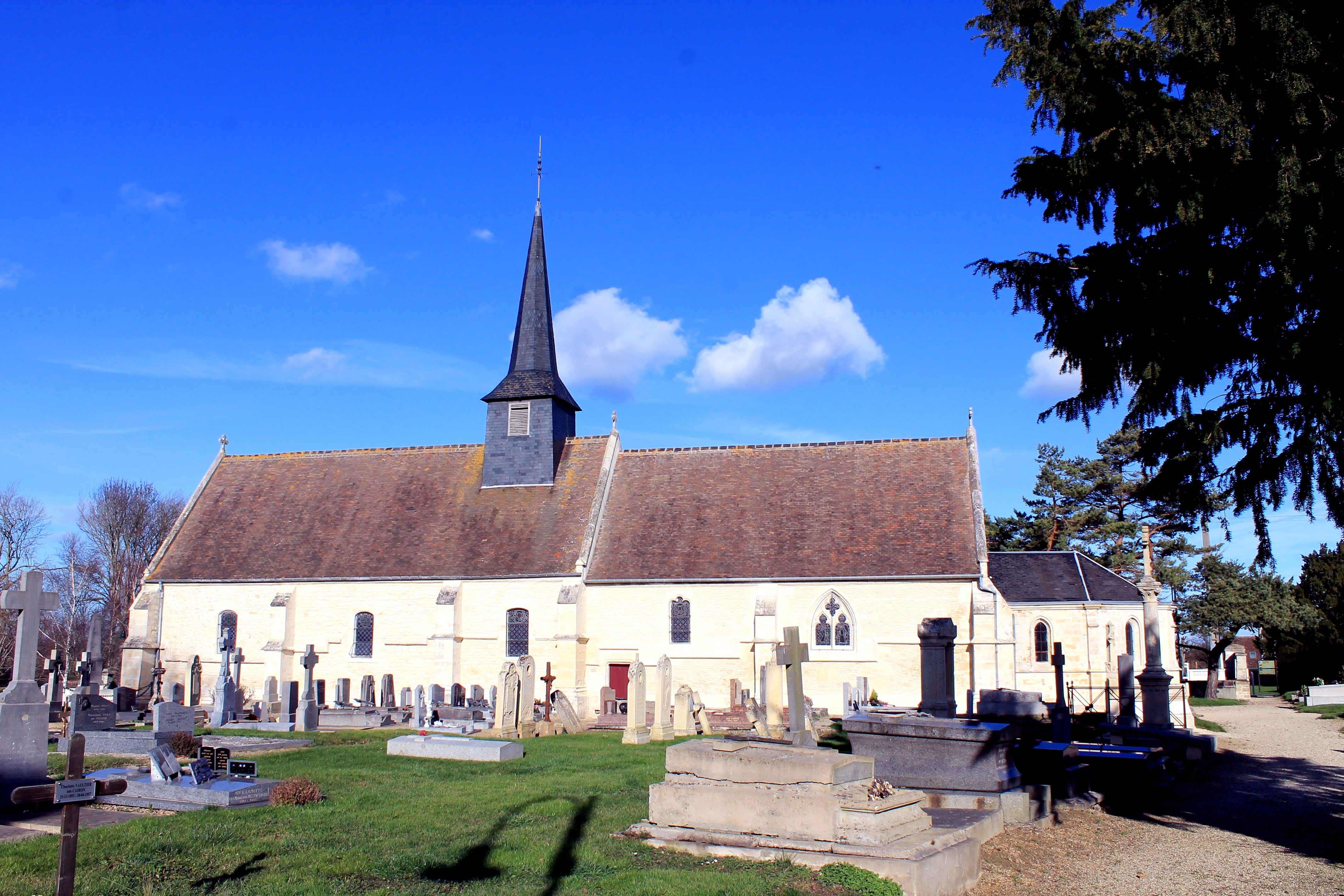 Église Sainte-Croix (XVIe siècle) à Gonneville-en-Auge (Calvados)